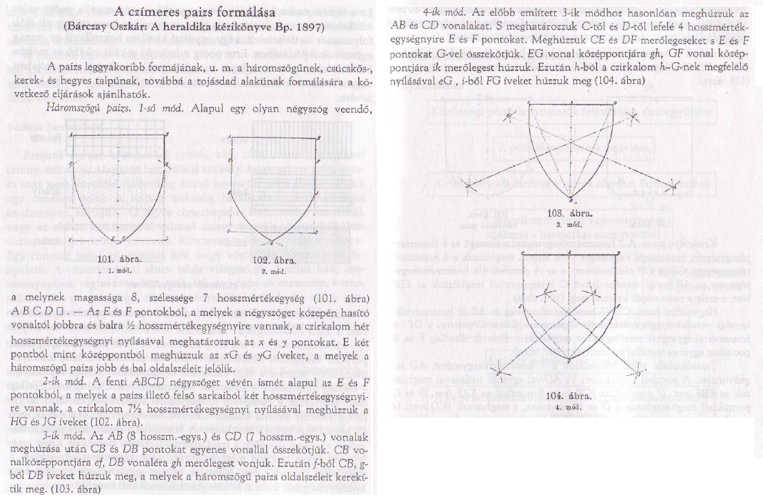 A háromszögű pajzs szerkesztése